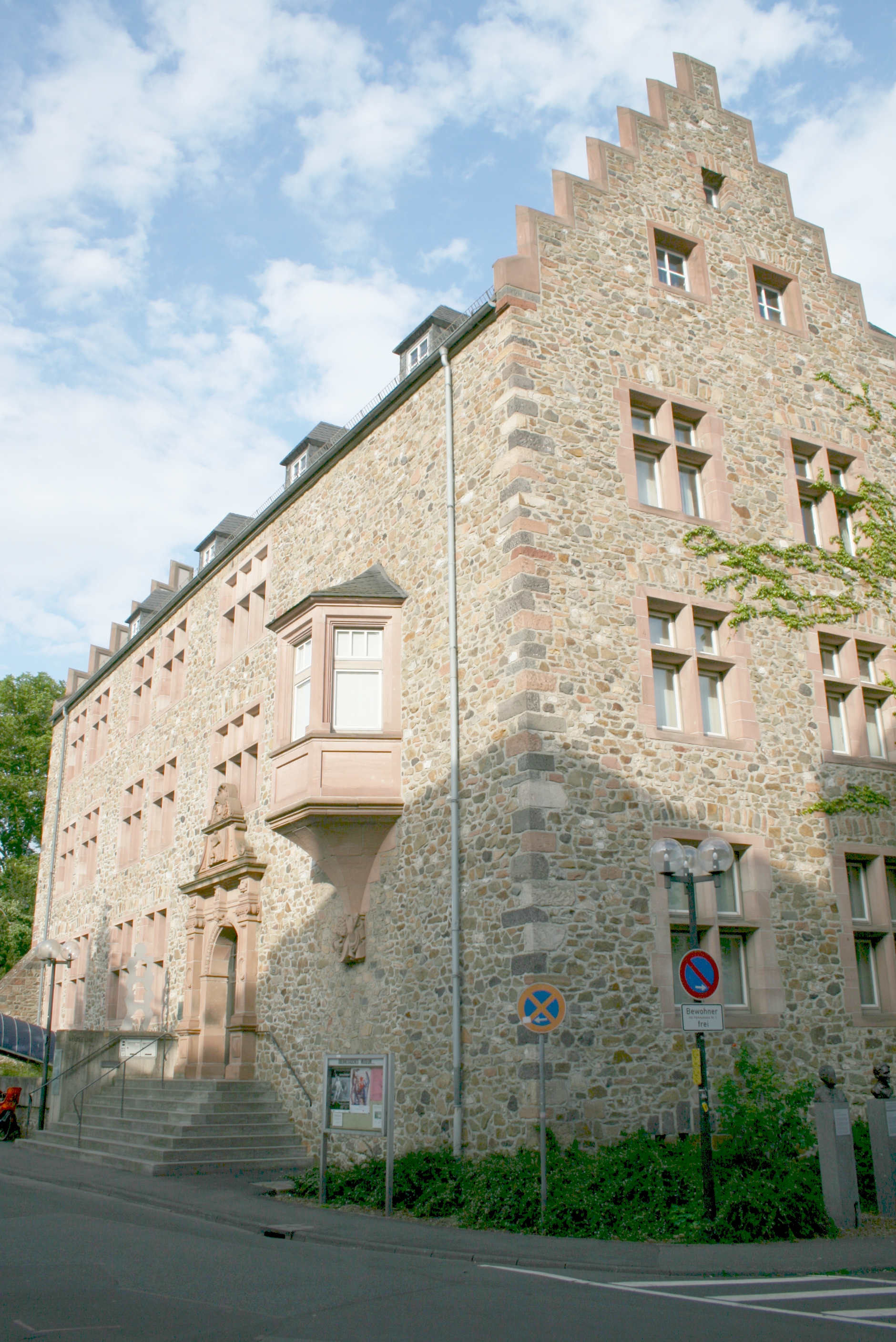 Altes Schloss in Gießen/"Old Castle" in Giessen, Germany